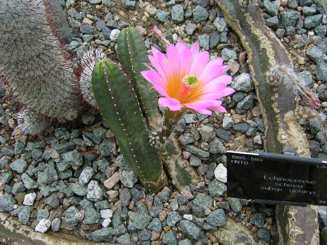 Echinocereus scheeri subsp. genryi at Kew Gardens